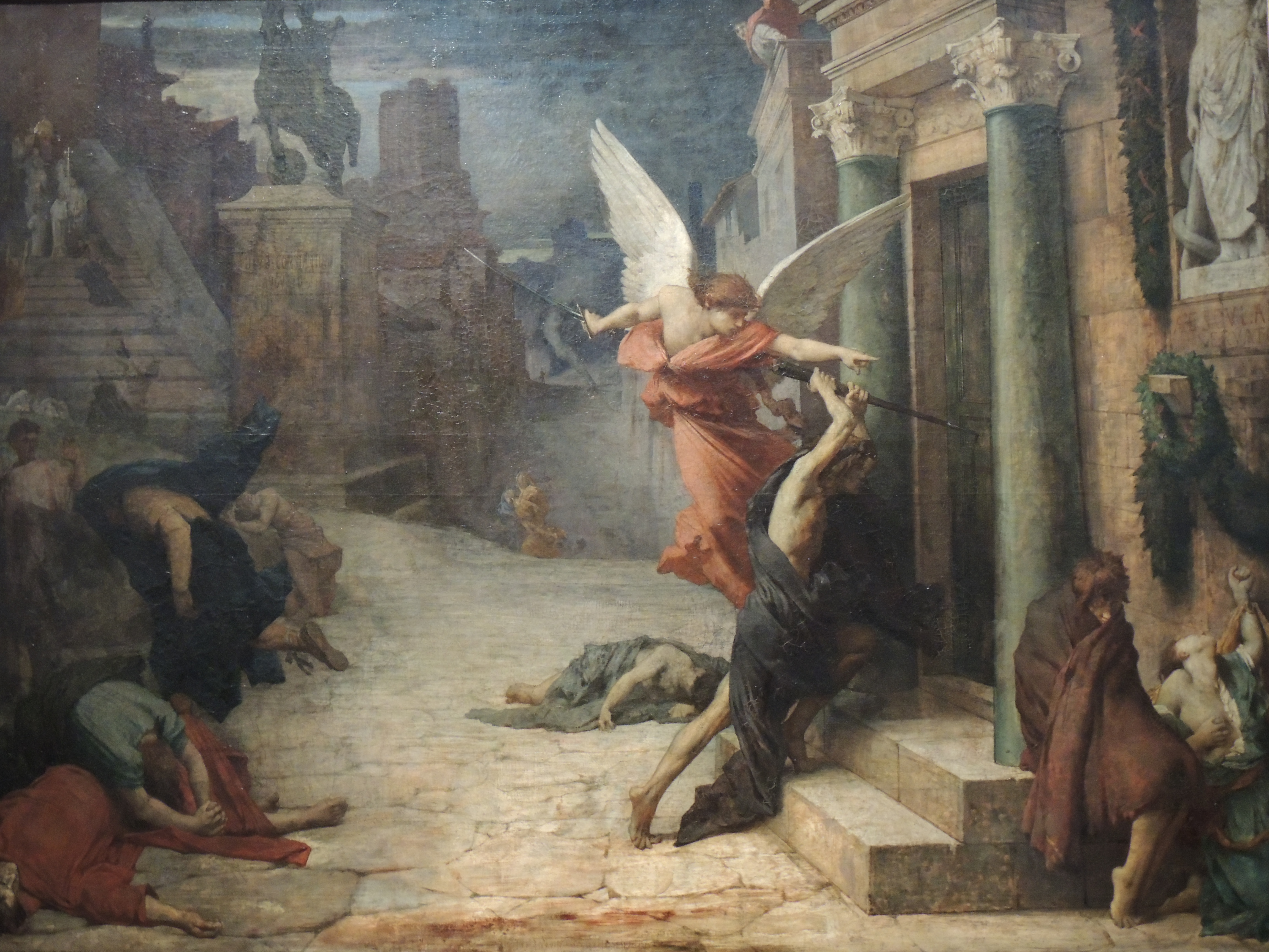 Jules-Élie Delaunay, Peste à Rome, huile sur toile